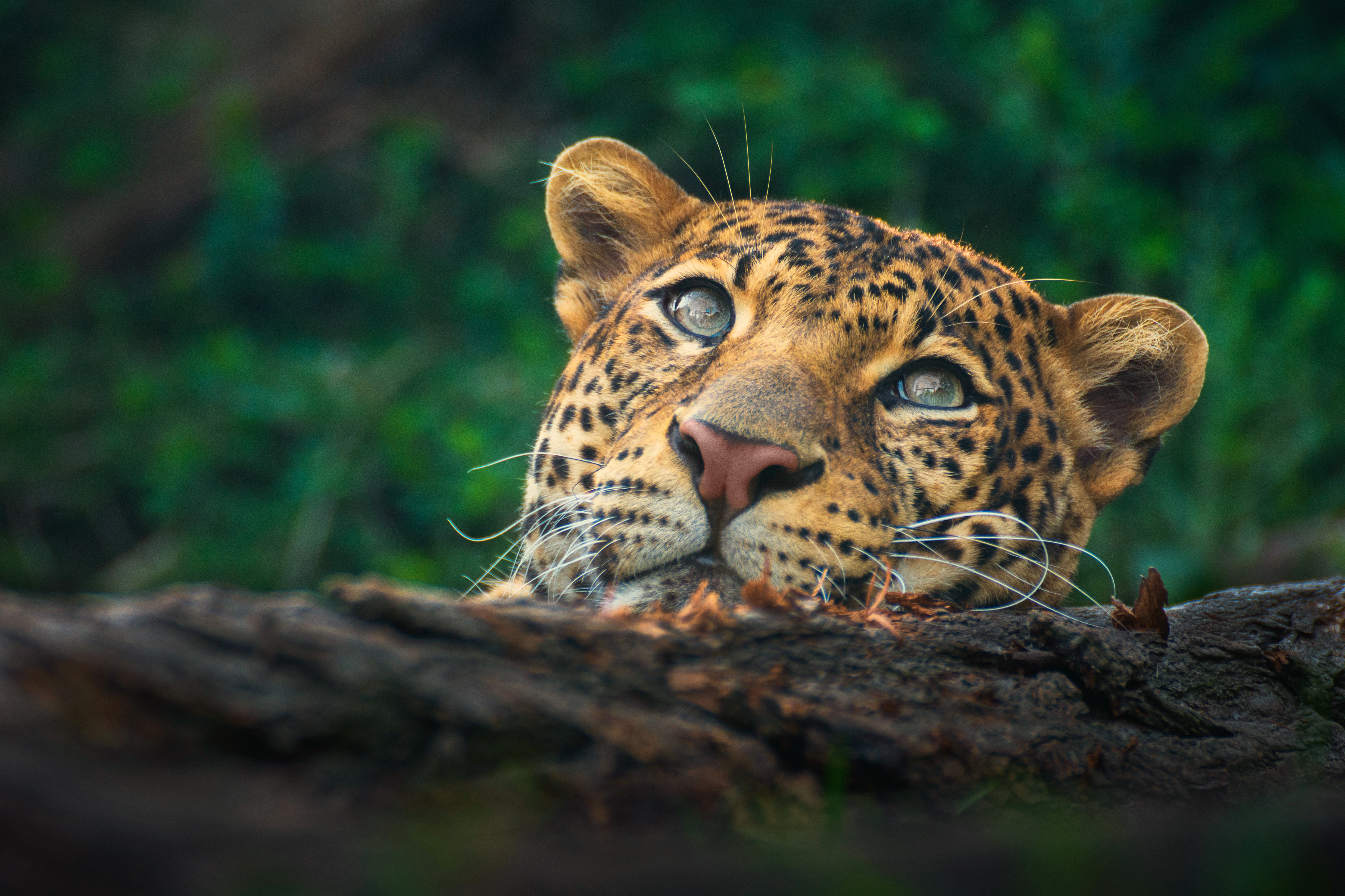 samec levharta jávského z pražské zoo